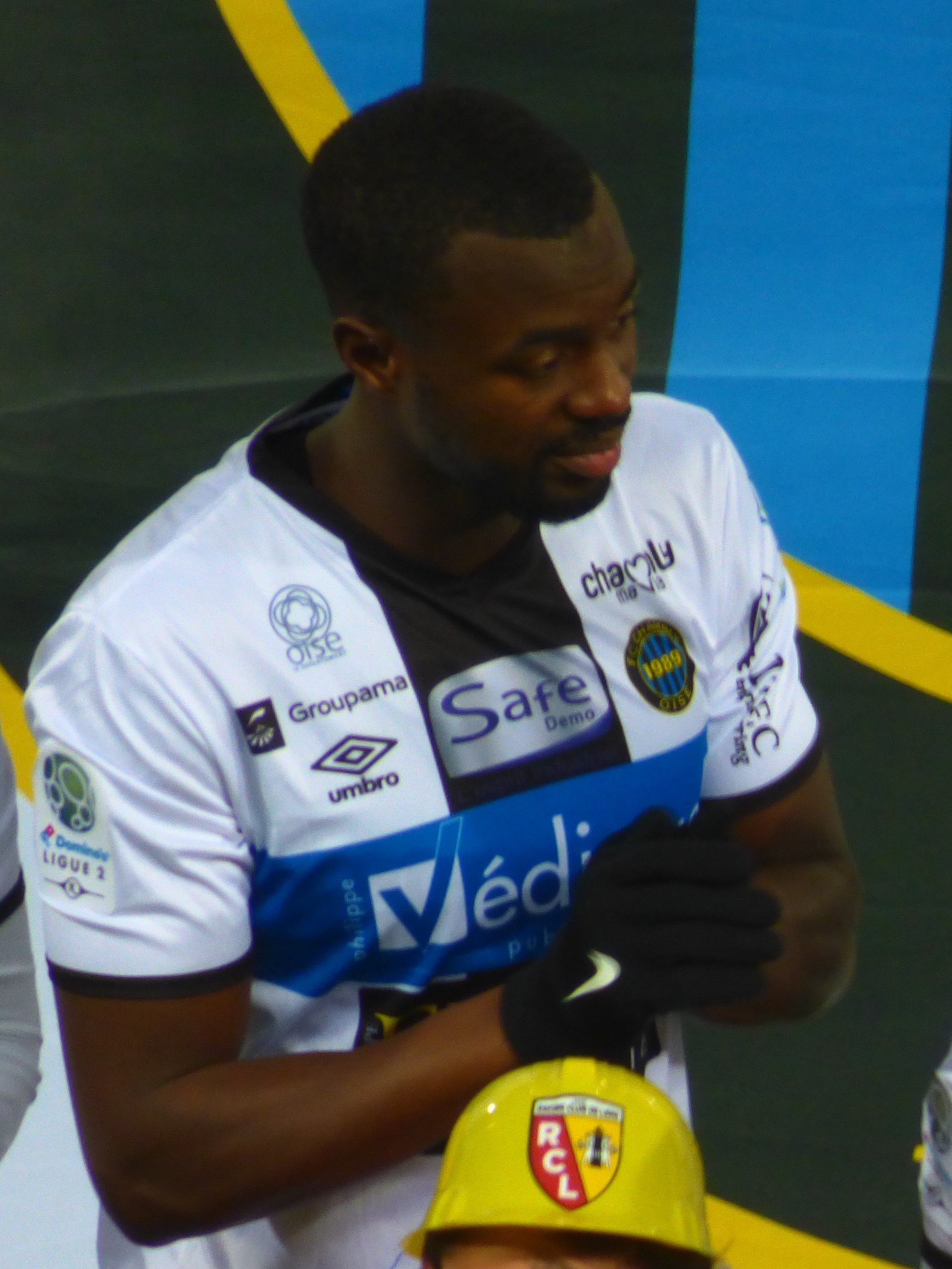 Diaranké Fofana avant le match Lens - Chambly, comptant pour la dix-septième journée du championnat de France de football de Ligue 2 2019-2020, le 3 décembre 2019.